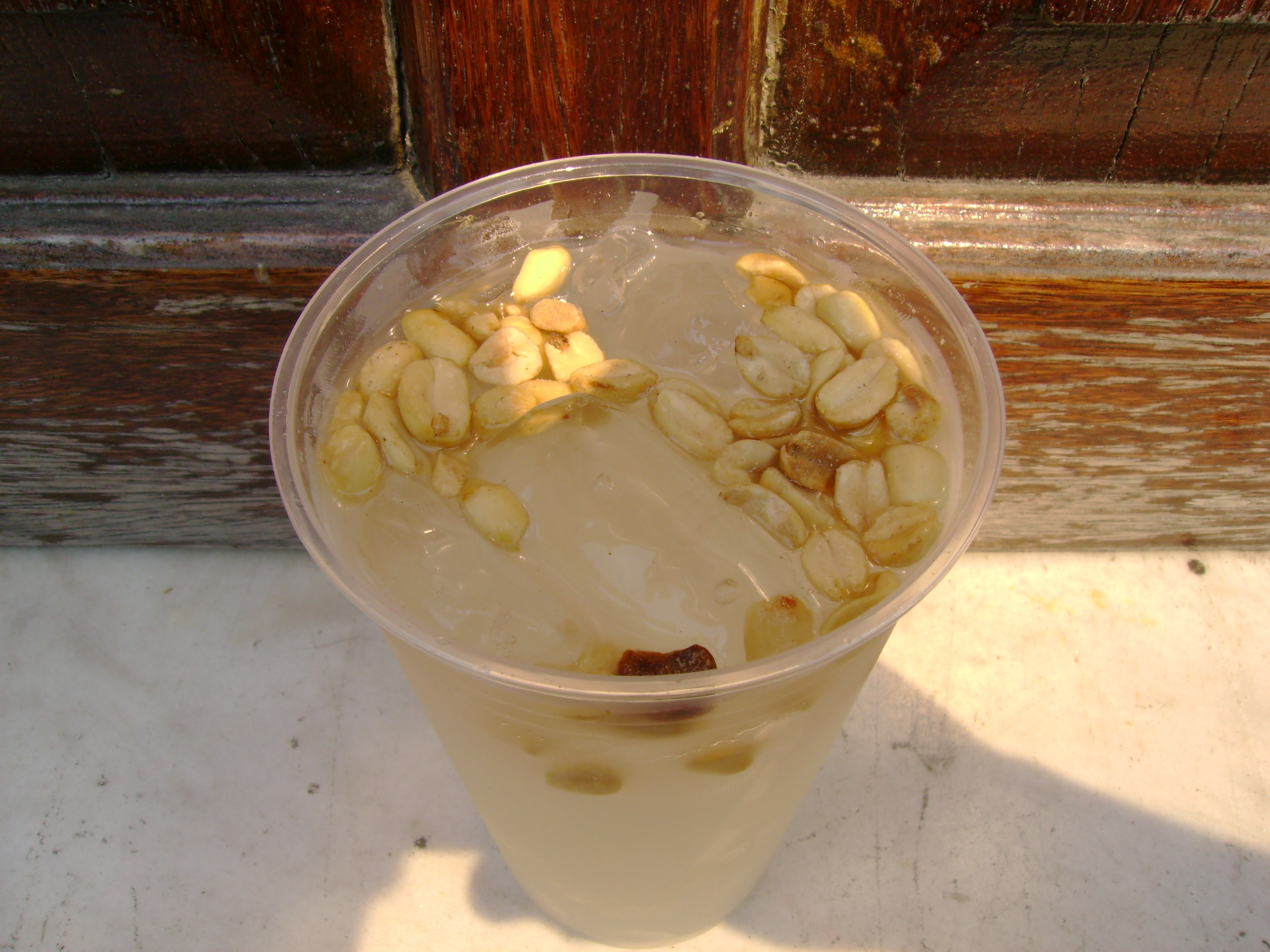 Tuba, bebida tipica colimense en la ciudad de Manzanillo, Colima, Mexico.